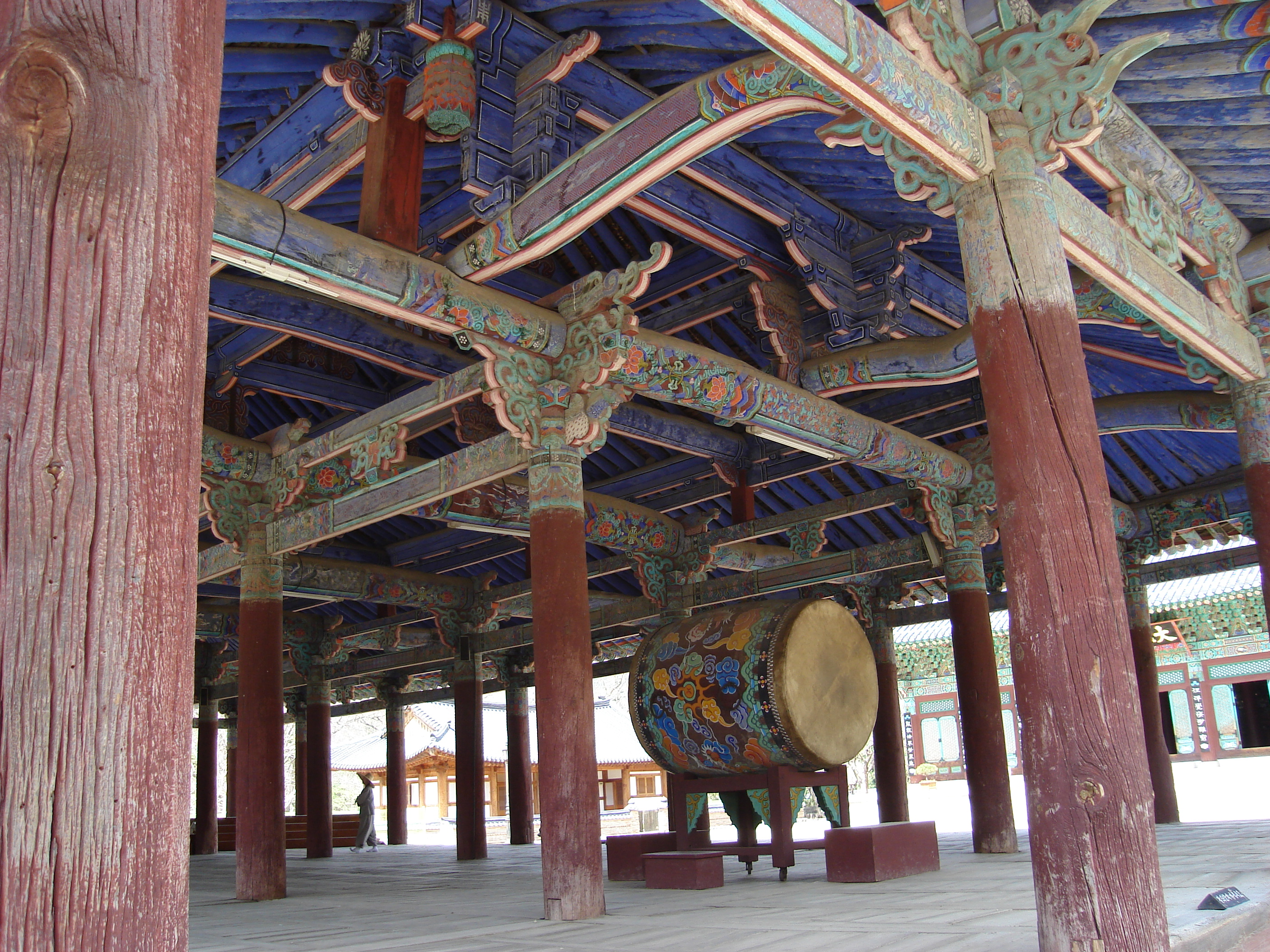 Un Mun Sa temple drum